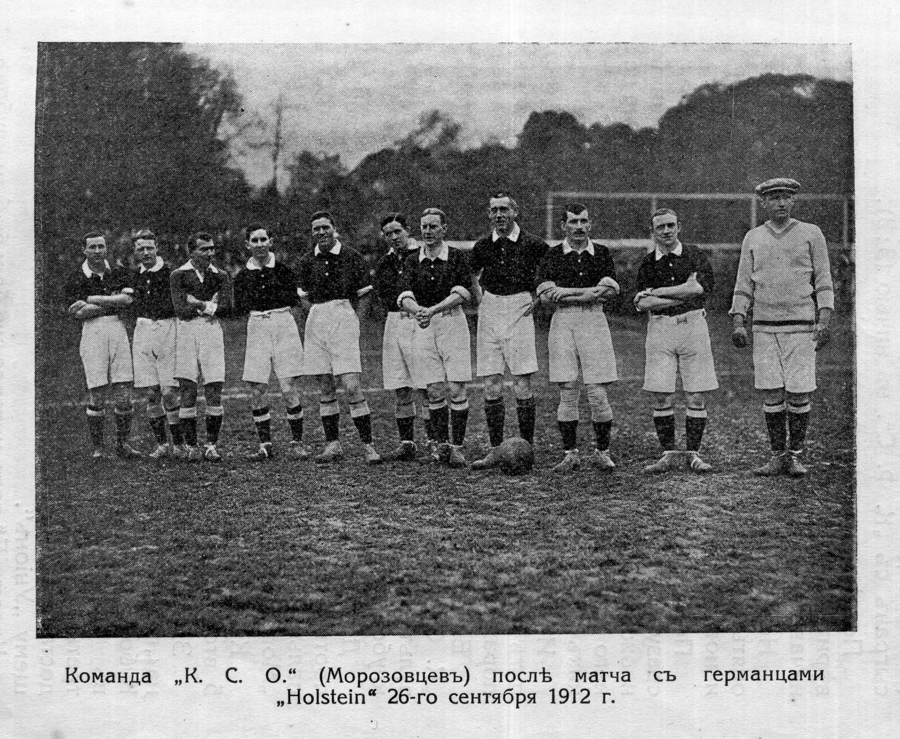 Футбольная команда "К.С.О." (Морозовцы) после матча с Holstein 26 сентября 1912 года